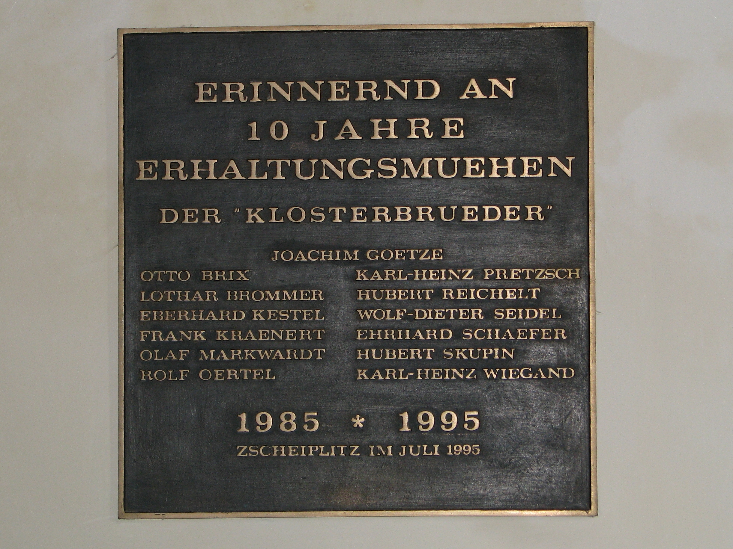 Klosterkirche Zscheiplitz bei Freyburg (Unstrut), Wiederaufbau zwischen 1984 und 1995 durch die Interessengemeinschaft Klosterkirche Zscheiplitz, Gedenktafel 1995 mit den Namen der Mitglieder der Interessengemeinschaft